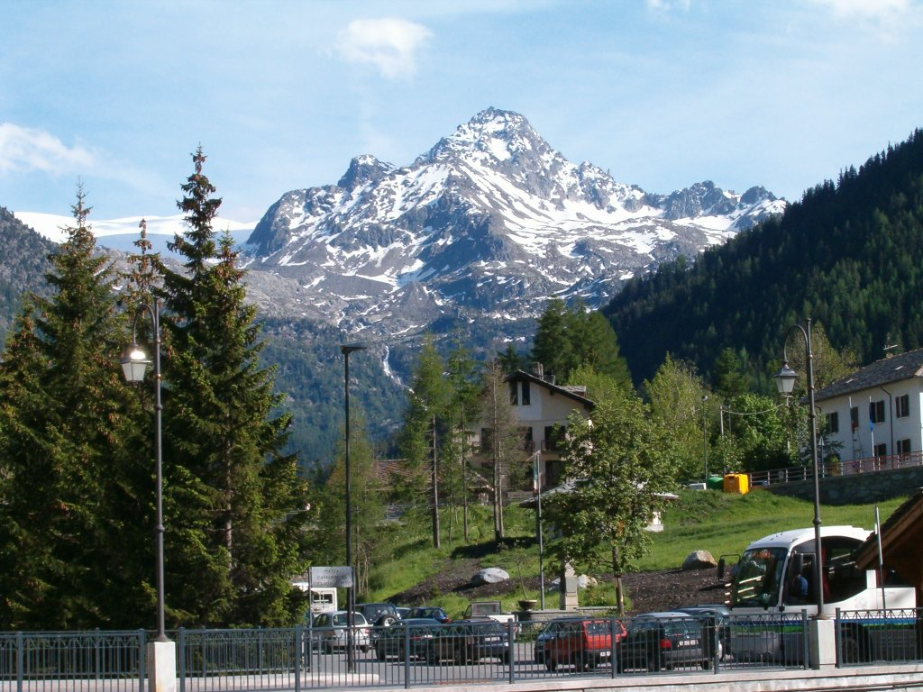 La Thuile, Valle d'Aosta, Italia